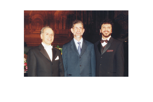 Maximiliano de Brito, Ricardo Tacuchian, Renato Mismetti